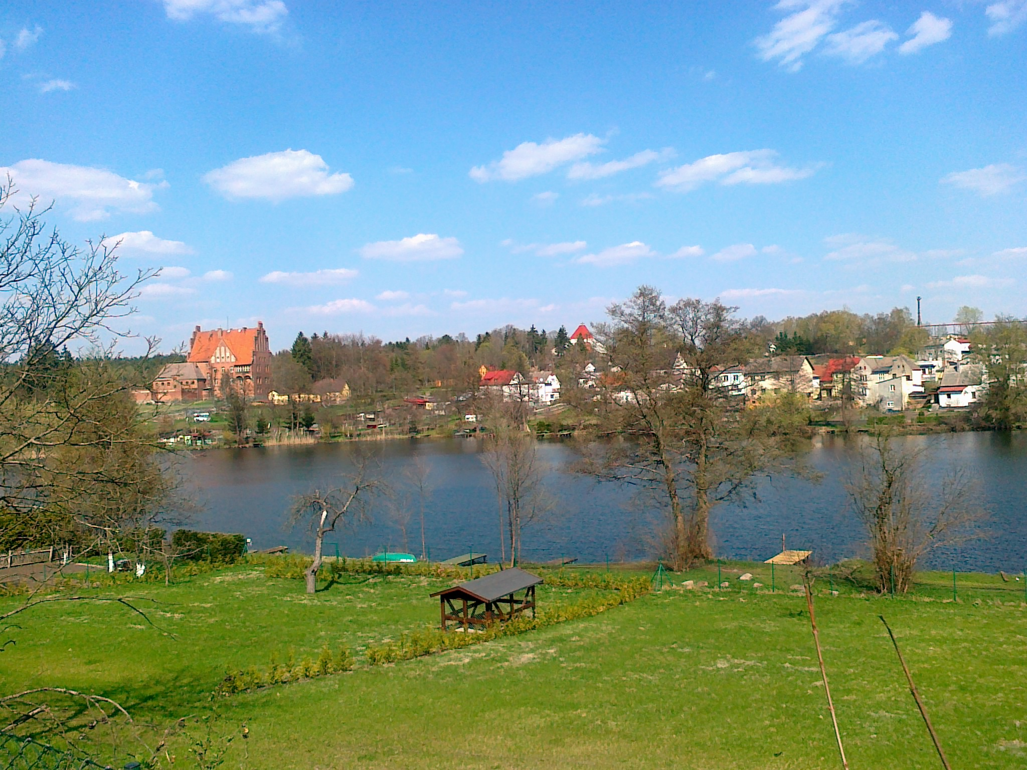 Widok na Jezioro Ławiczka w Białym Borze